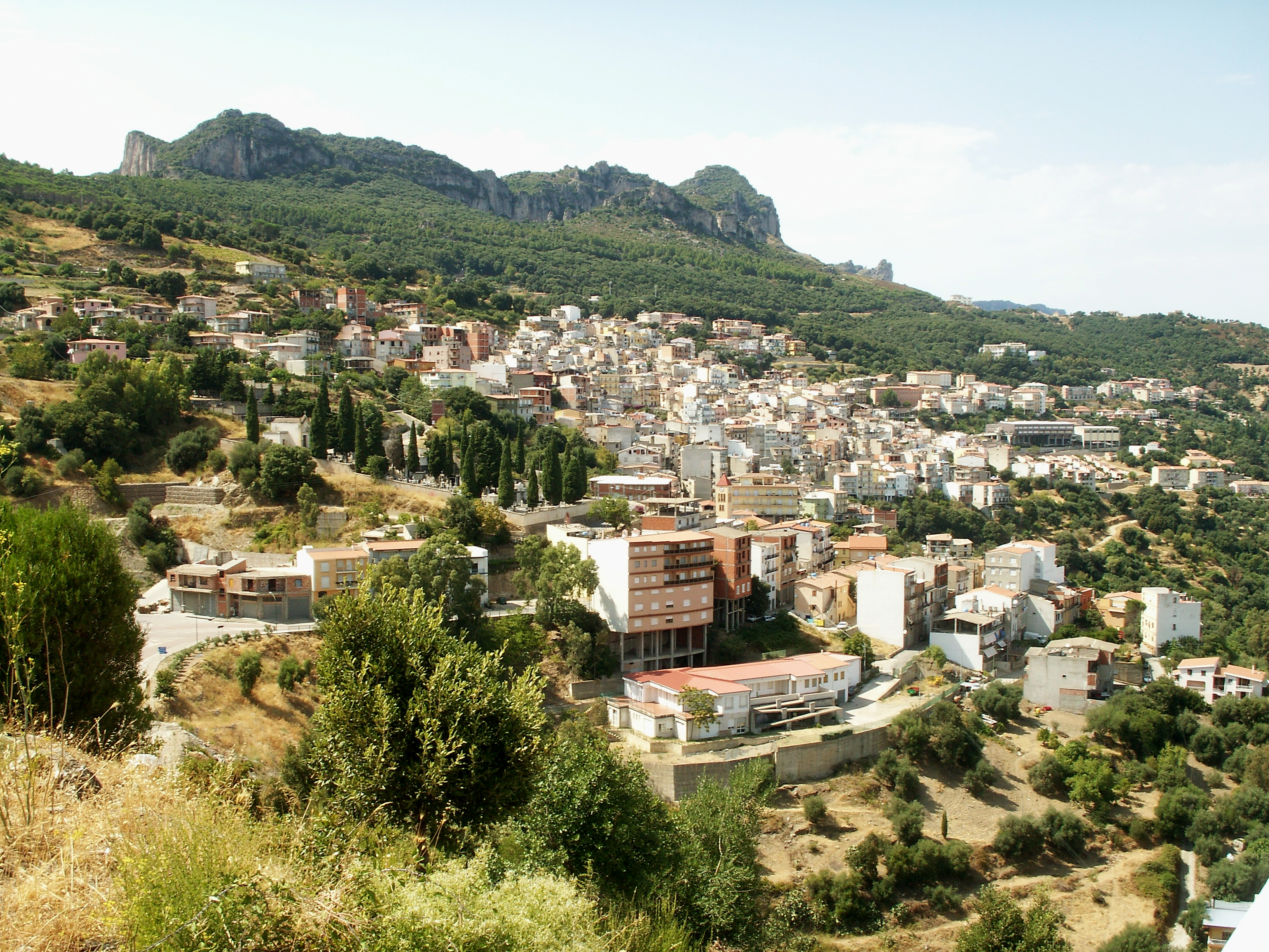 Jerzu, provincia dell'Ogliastra